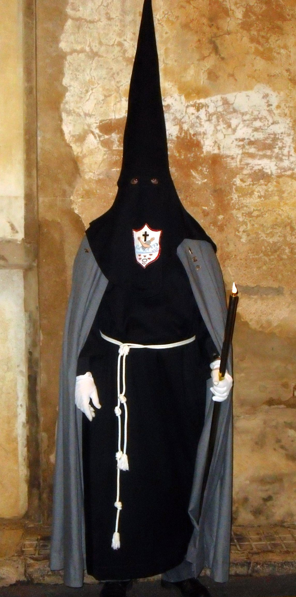 Vestimenta d'un confrare de la Confraria de Penitents de la Joventut Seràfica de Llucmajor